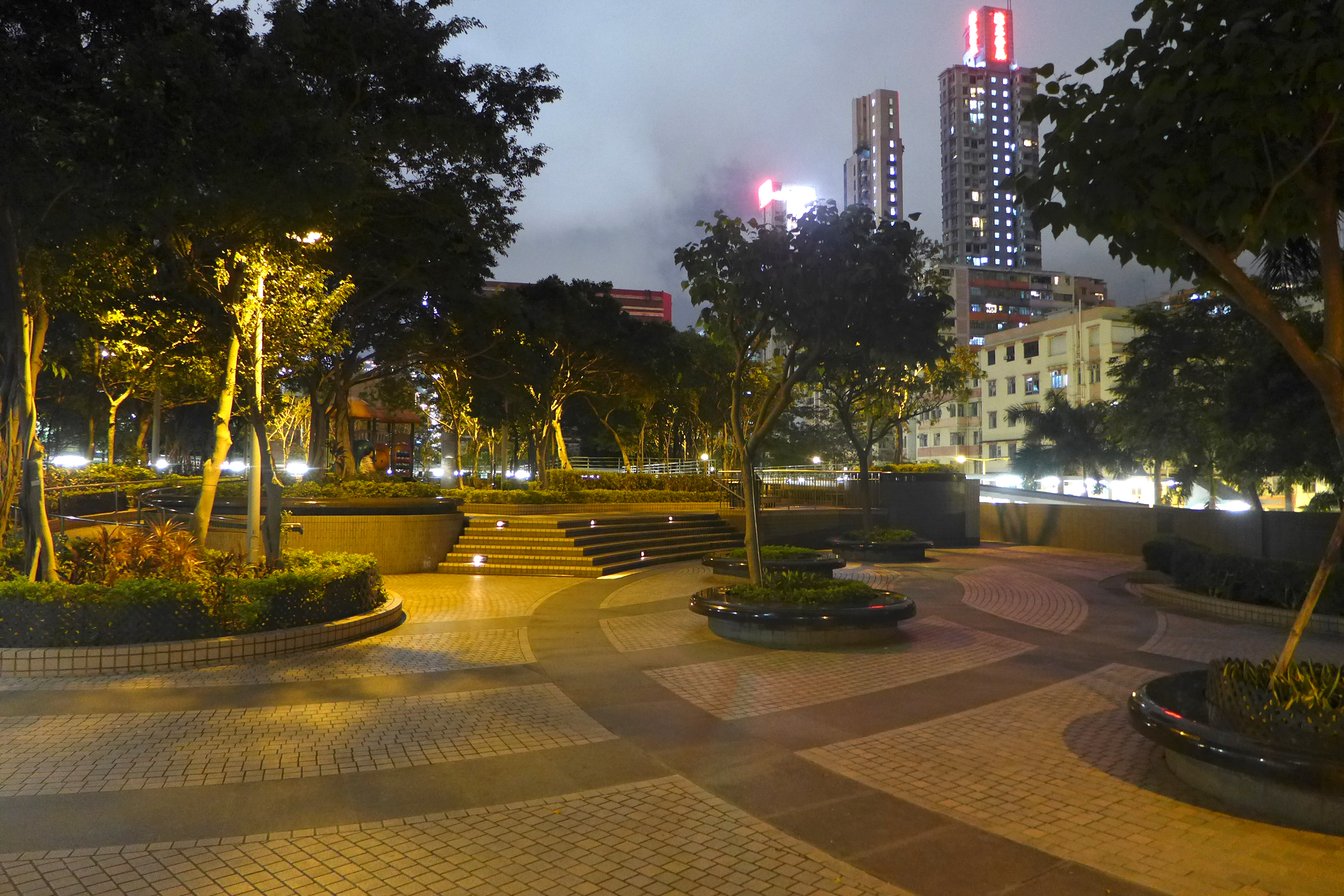 Royal Peninsula Car Entrance